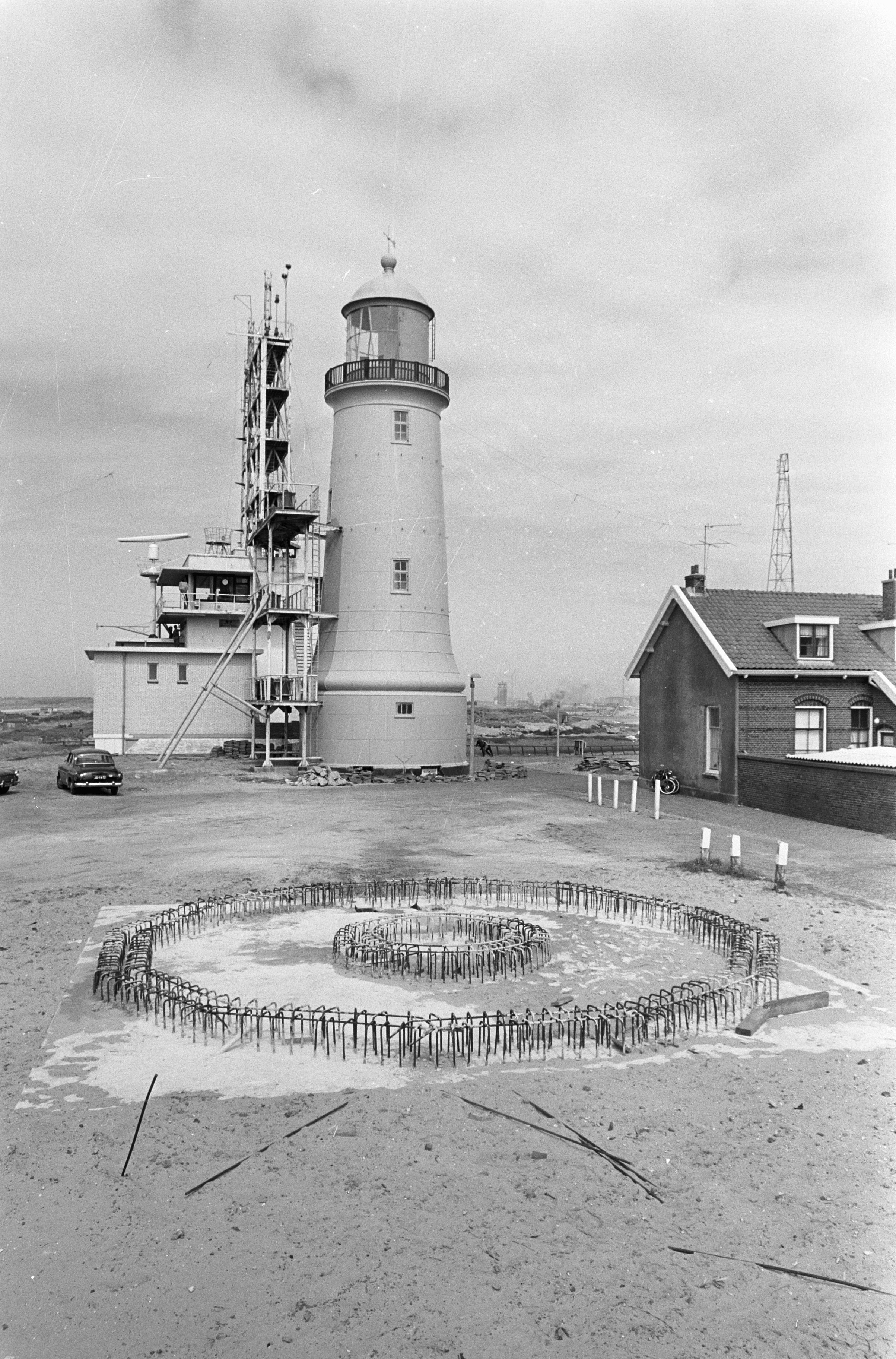 Vuurtoren te IJmuiden aan de rol, op voorgrond fundamenten voor vuurtoren.